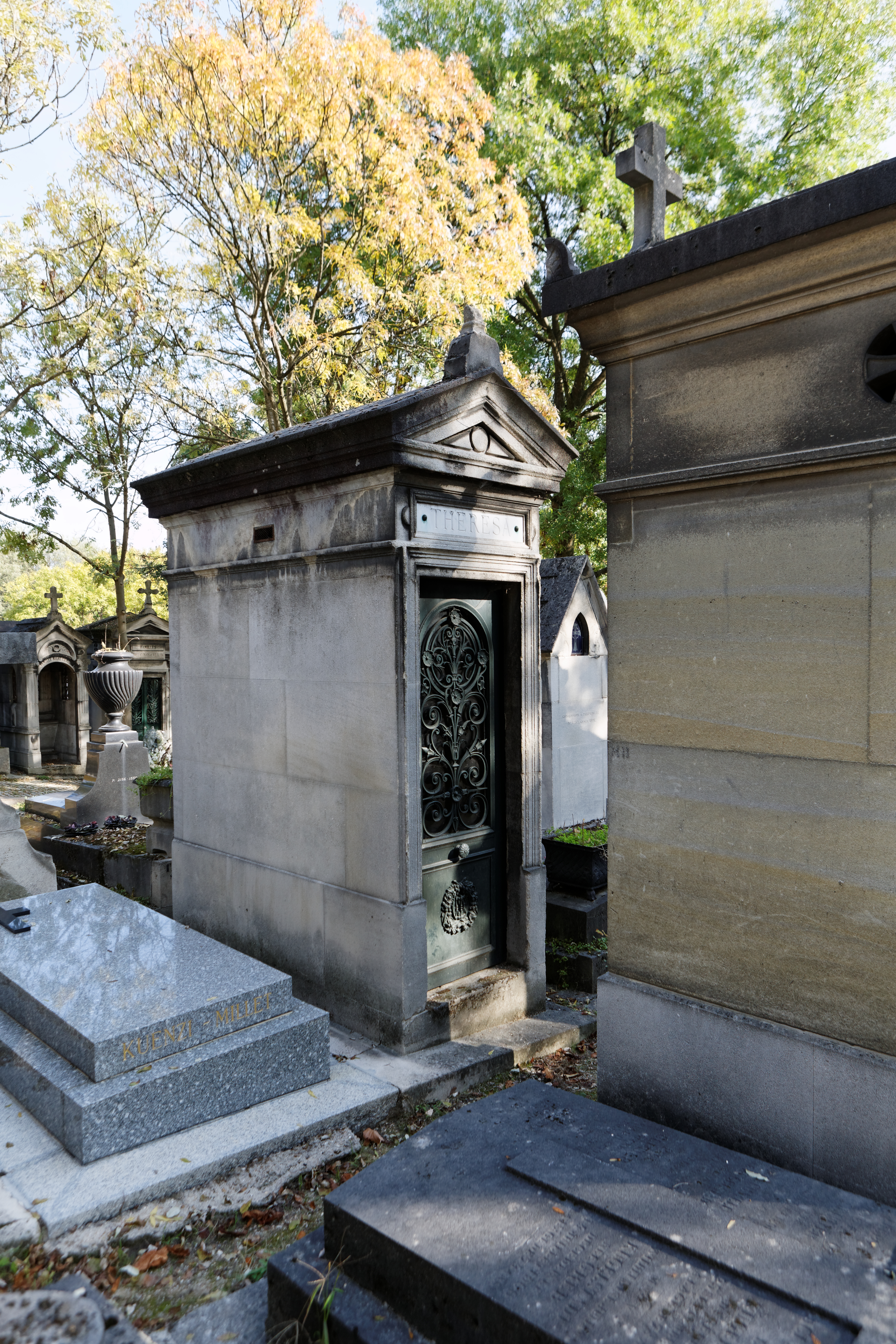 Sépulture d'Emma Valladon dite Thérésa (1837-1913), chanteuse de cabaret.